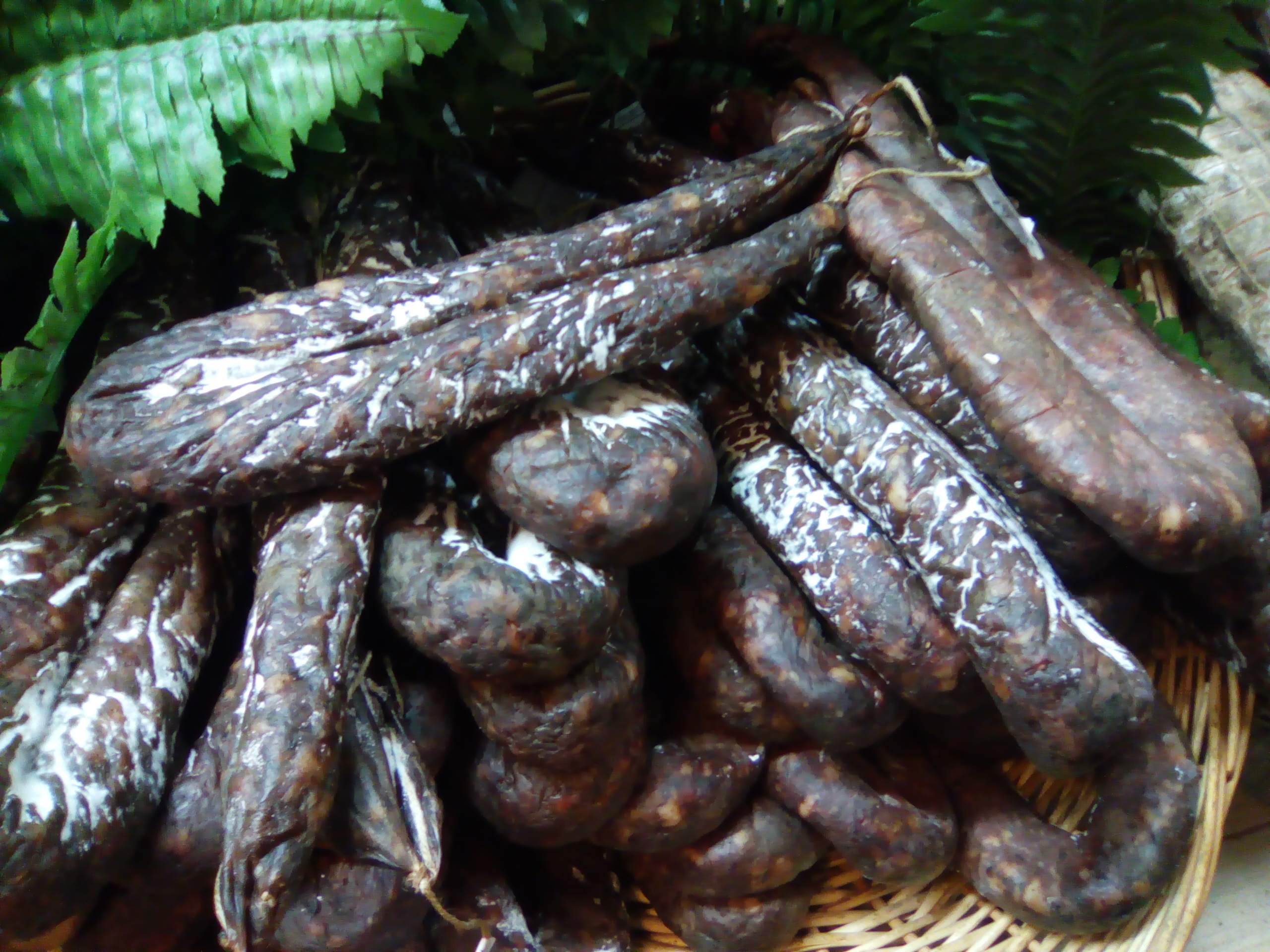 Salon Saveurs des Plaisirs gourmands.